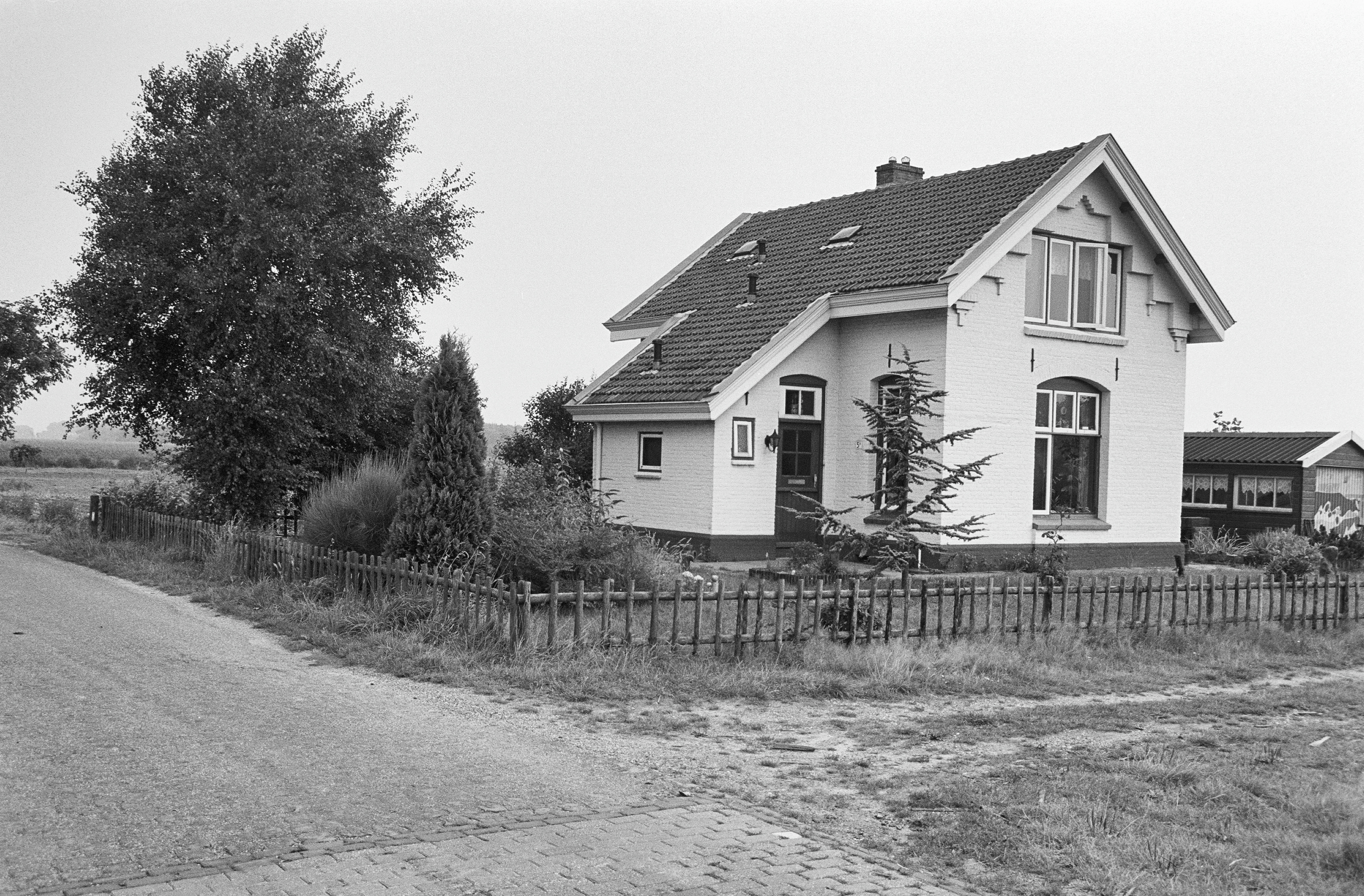 Wachtpost 21: Exterieur OVERZICHT